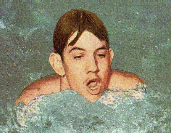 MUNCHEN/MONACO '72-PANINI-Figurina n.183- MAHONEY - CANADA -NUOTO-Rec